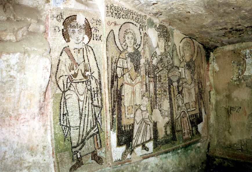 Mosaike in der Kapelle des Amphitheather in Durres , Albanien